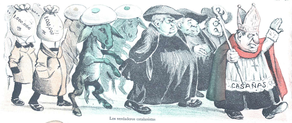 Caricatura.